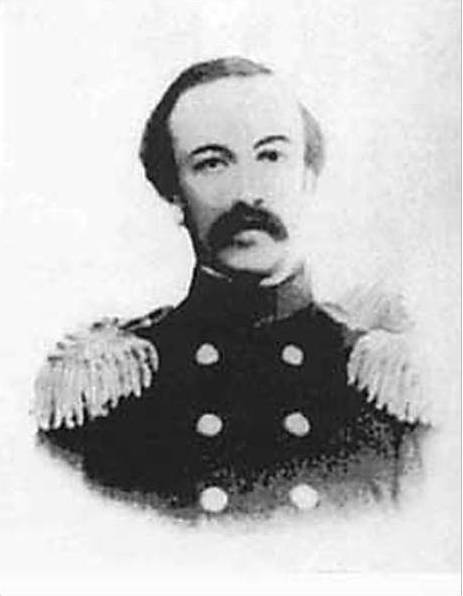 Фотография Николая Буссе, первого начальника Сахалина (1853-1854) и первого военного губернатора Амурской области